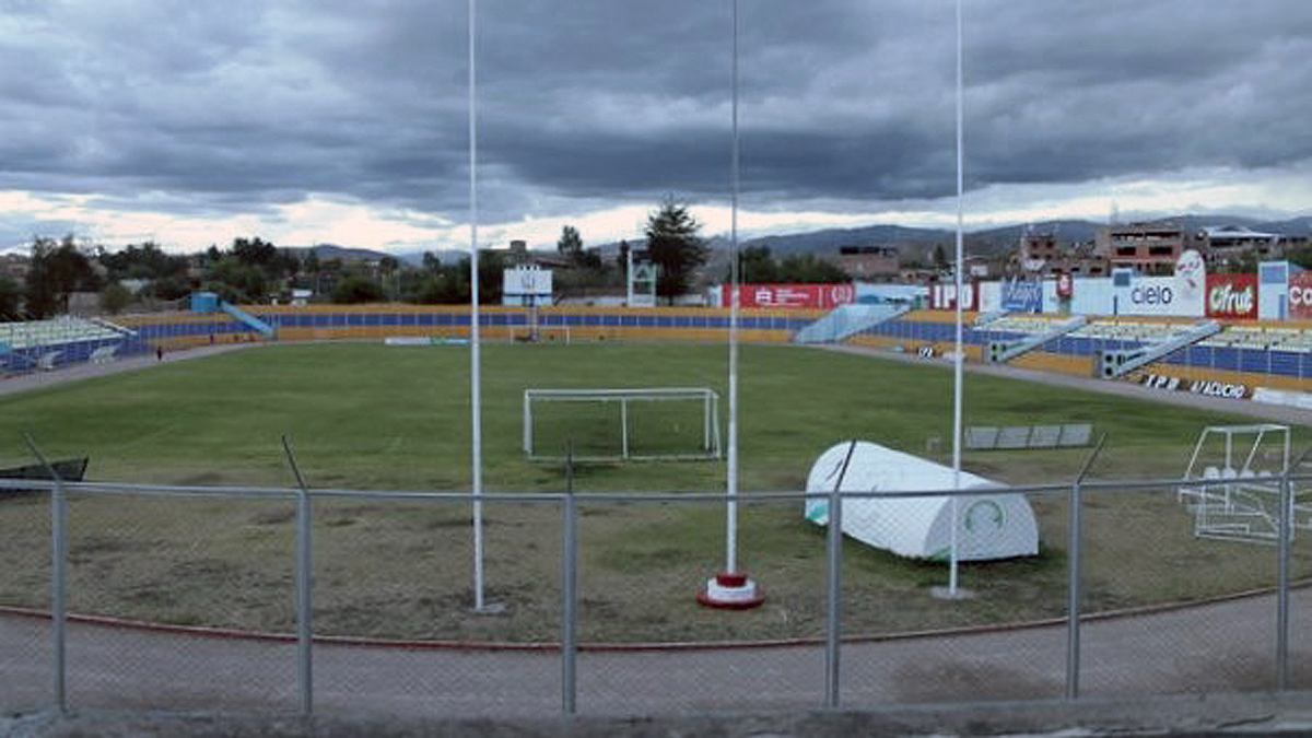 Sede principal de Ayacucho FC.